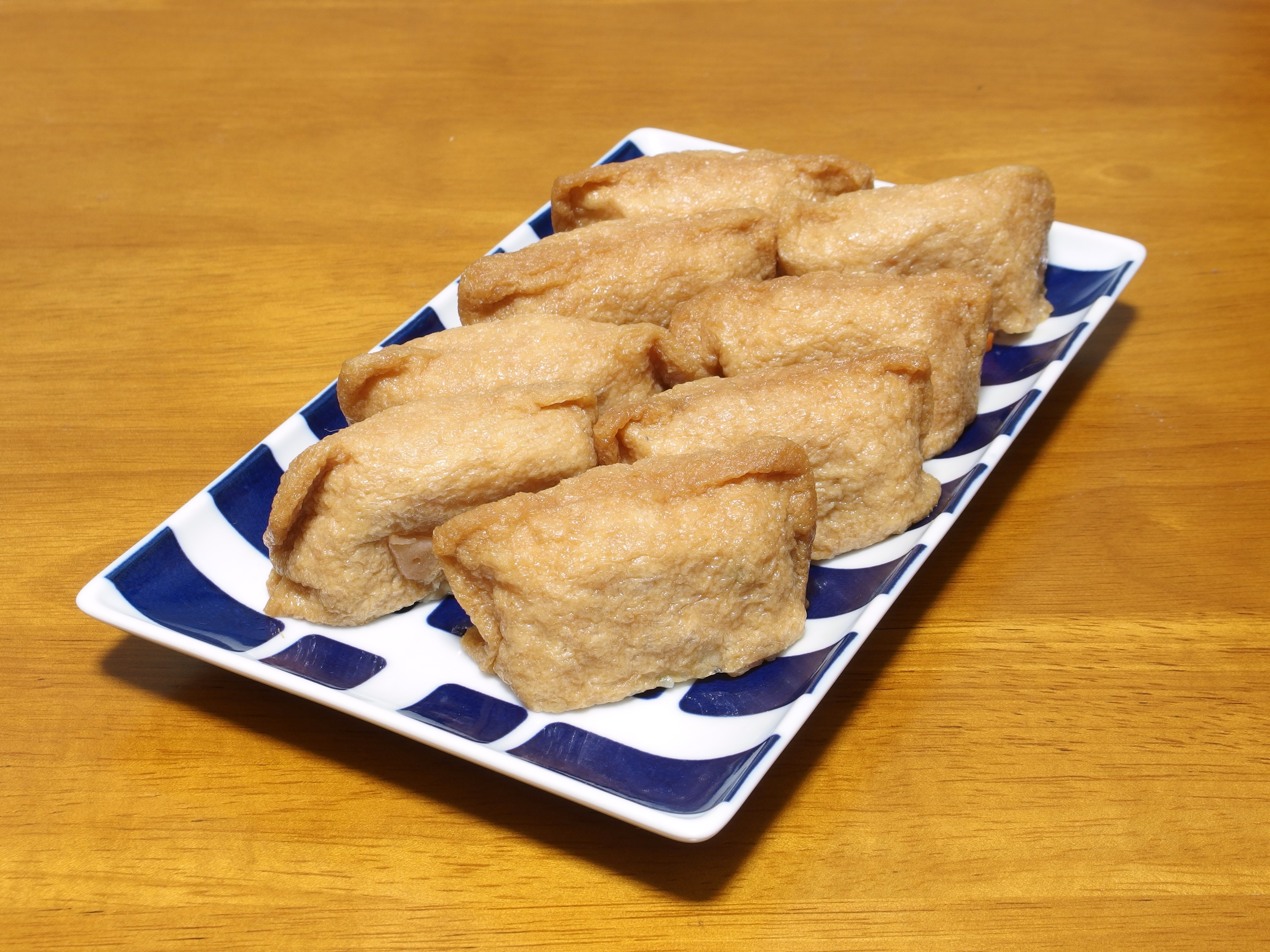 初午に食するいなり寿司。